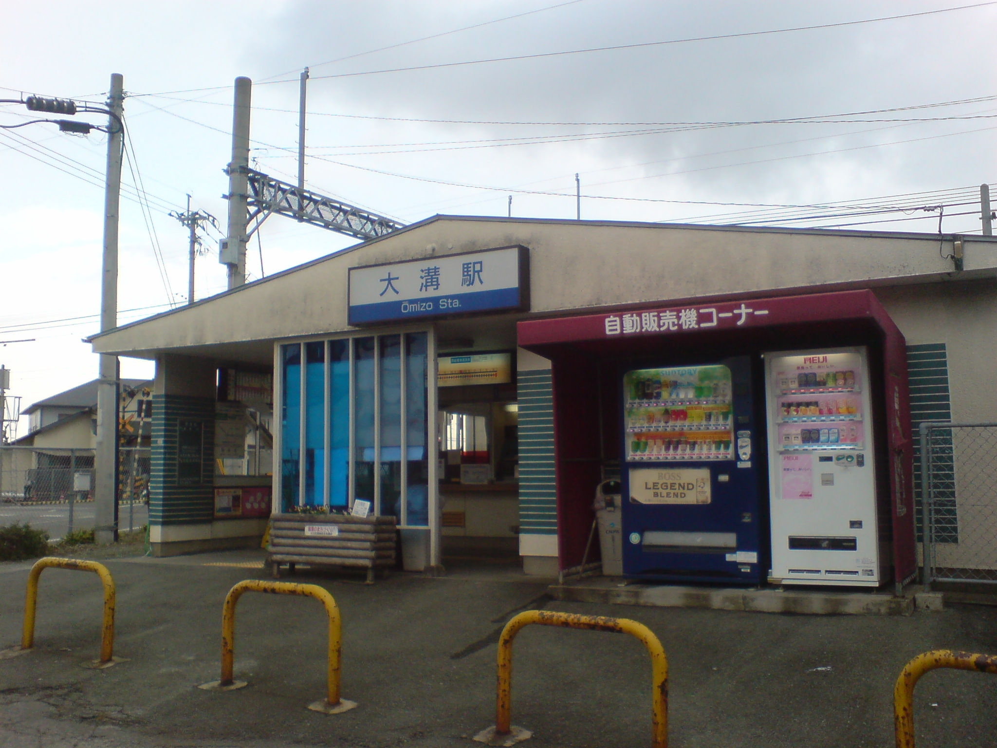 本人が駅前で撮影。